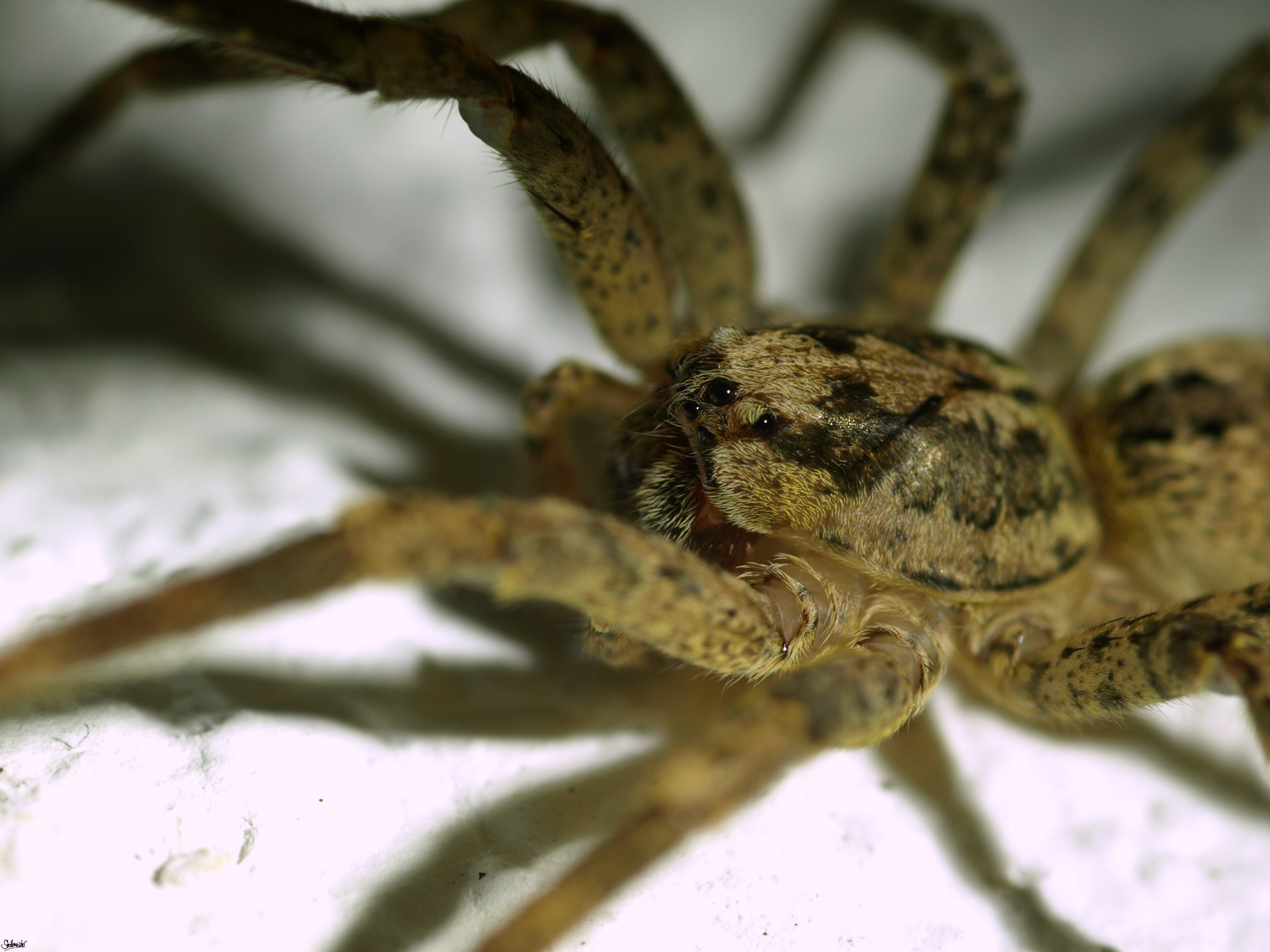 Zoropsis spinimana, Makroaufnahme